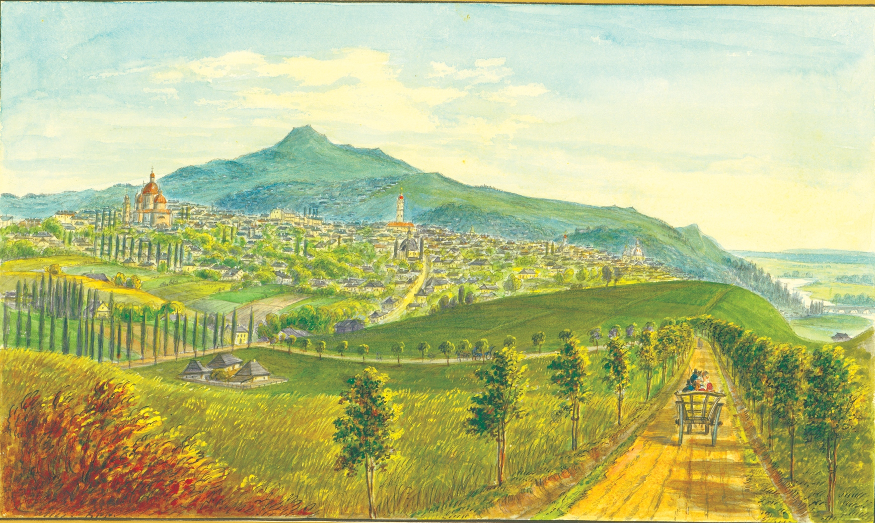 Landes Haupt Stadt Czernowitz